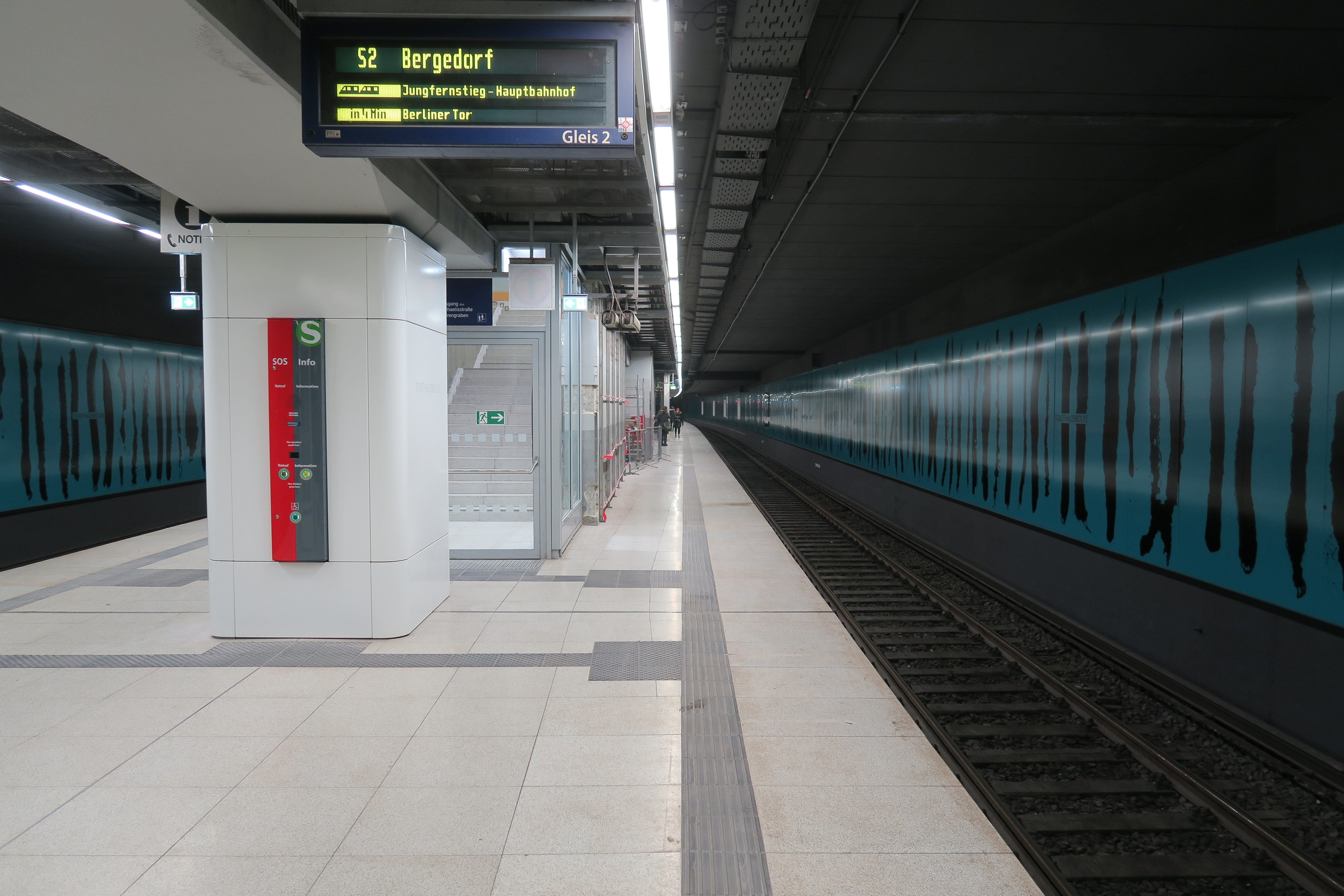 S-Bahnhof Stadthausbrücke, März 2018